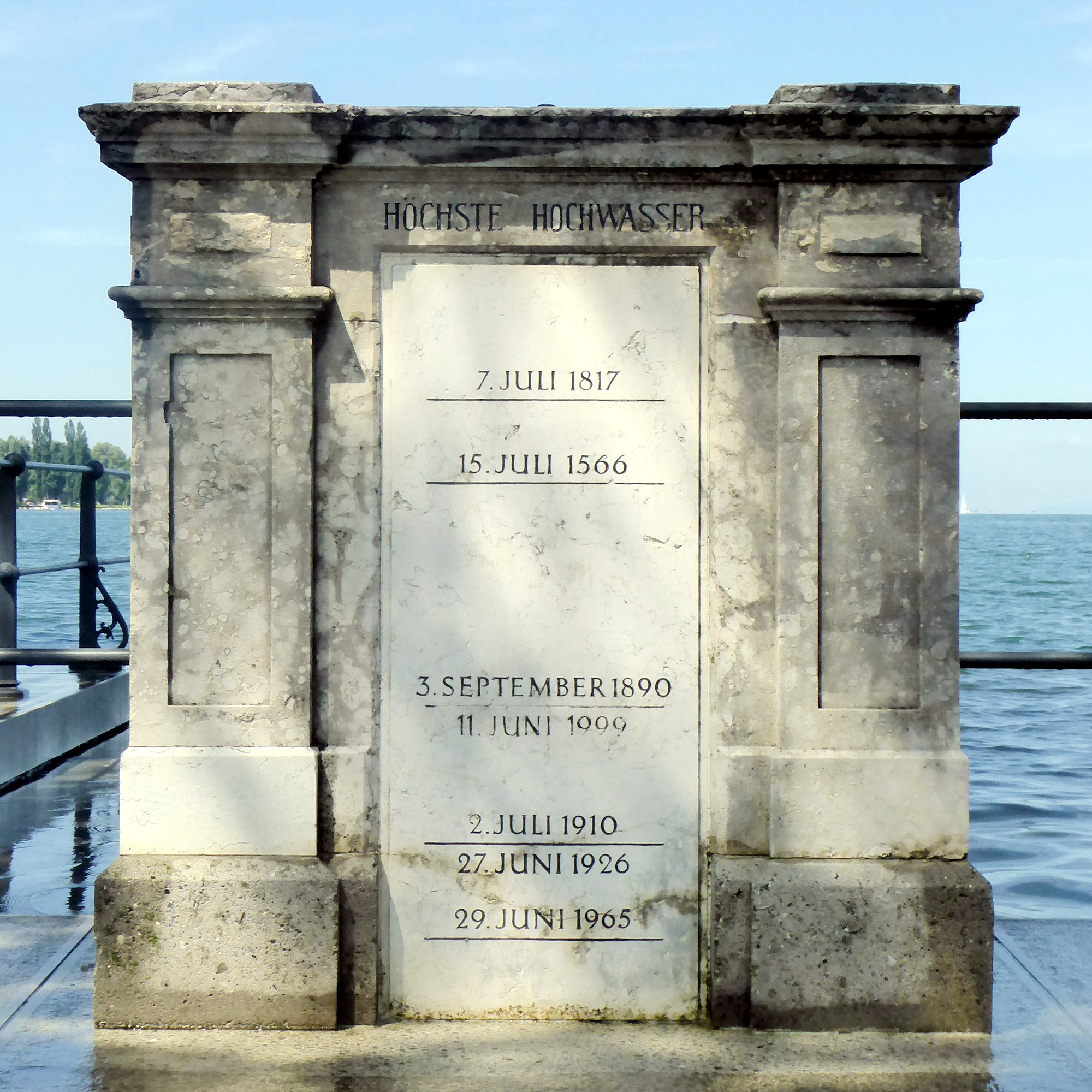 Hoochwassermarkierunge am Bodesee z' Breagaz.